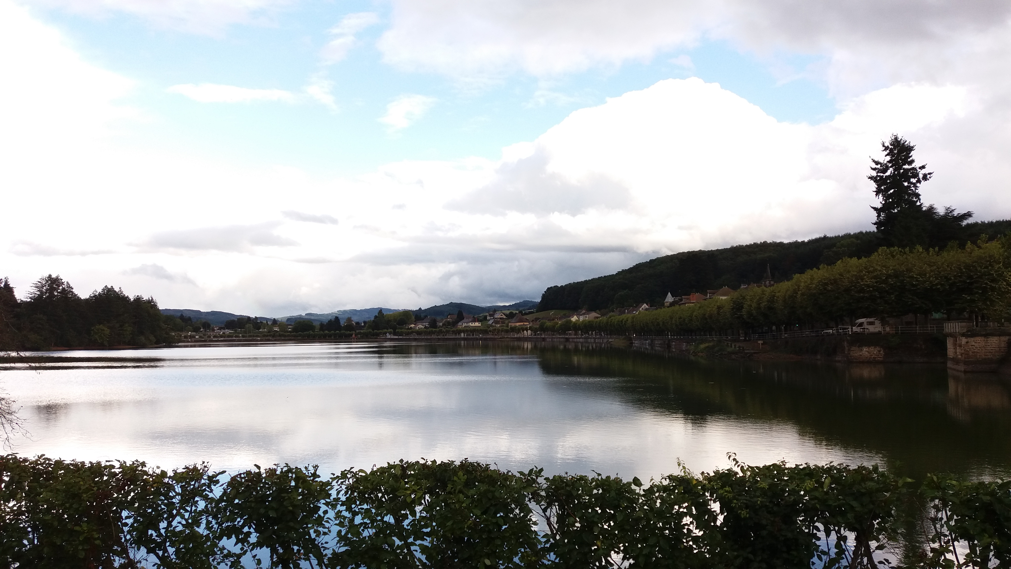 Lac depuis le pont-levis.